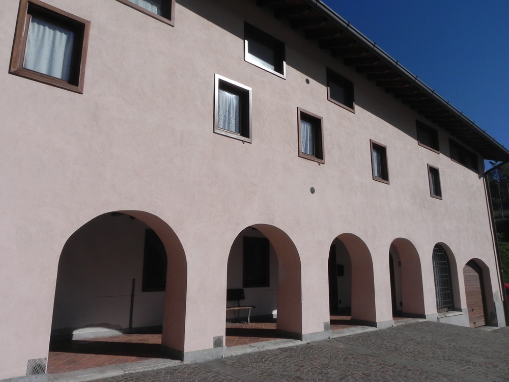 Ex Convento annesso alla Chiesa della Madonna delle Grazie a Gorno